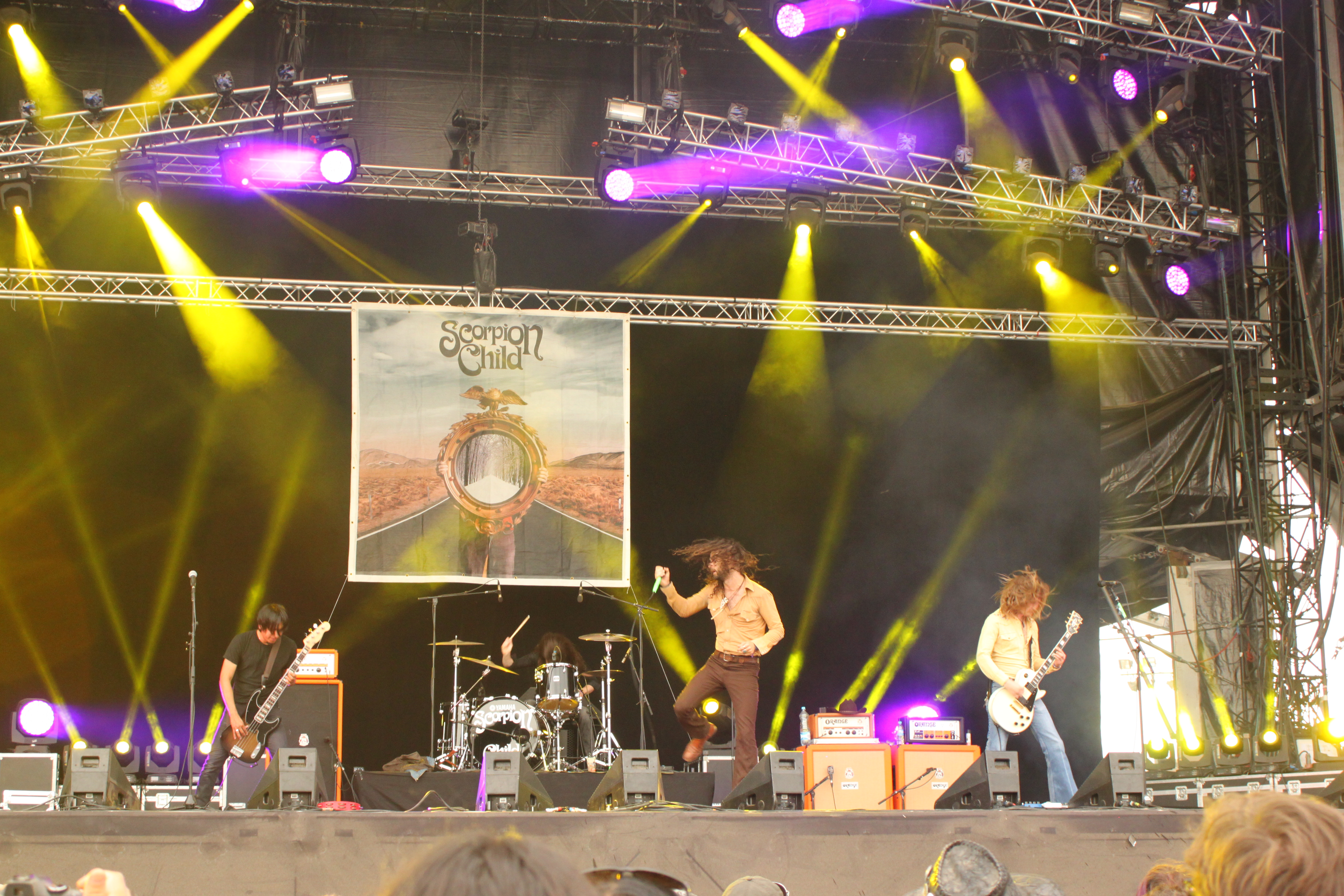 Hellfest 2014. Scorpion Child. Fr-44-Clisson.